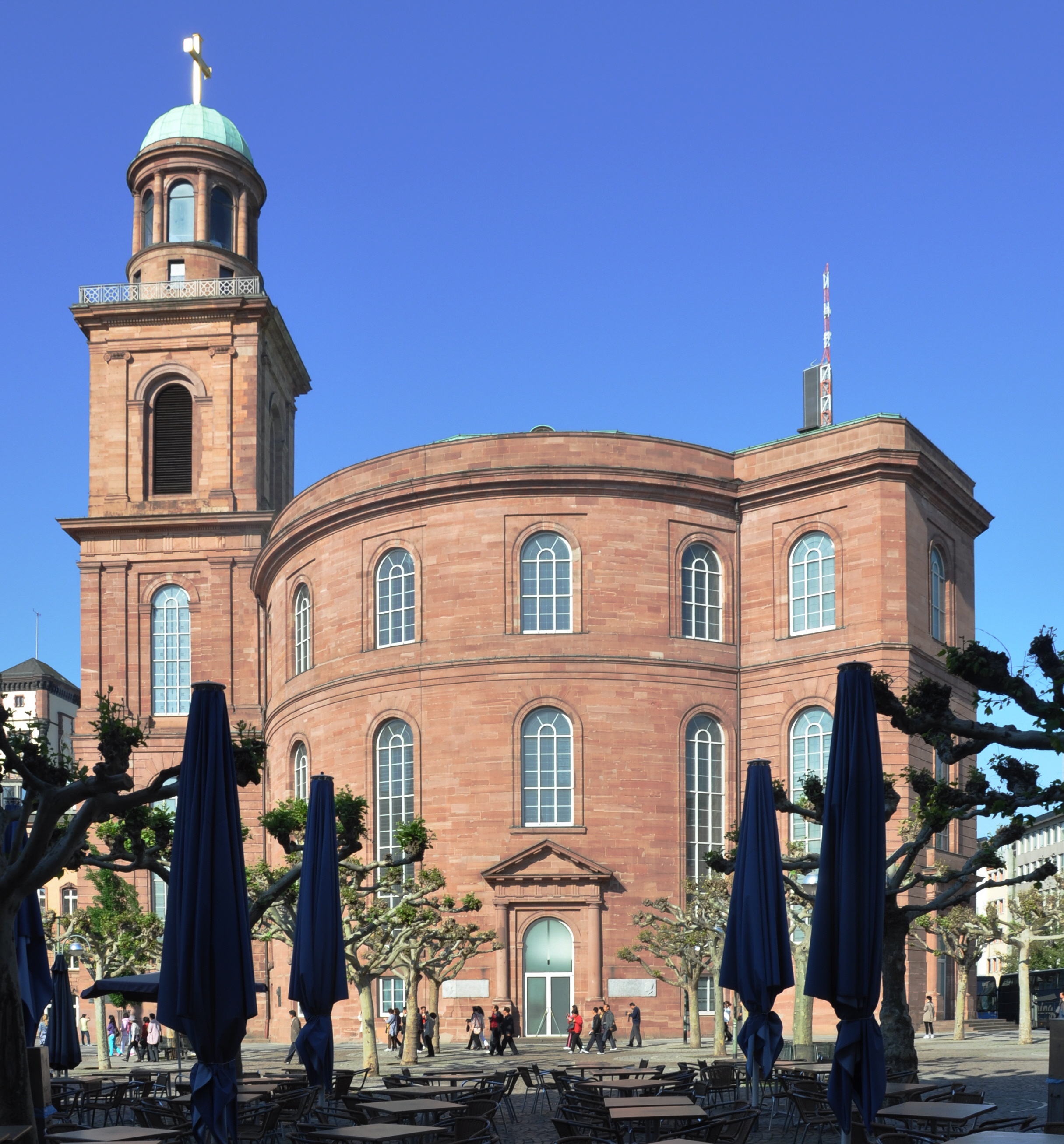 Frankfurt am Main, Paulskirche